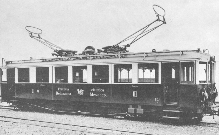 BCe 4/4 2 der Ferrovia Bellinzona–Mesocco (BM), Werkfoto